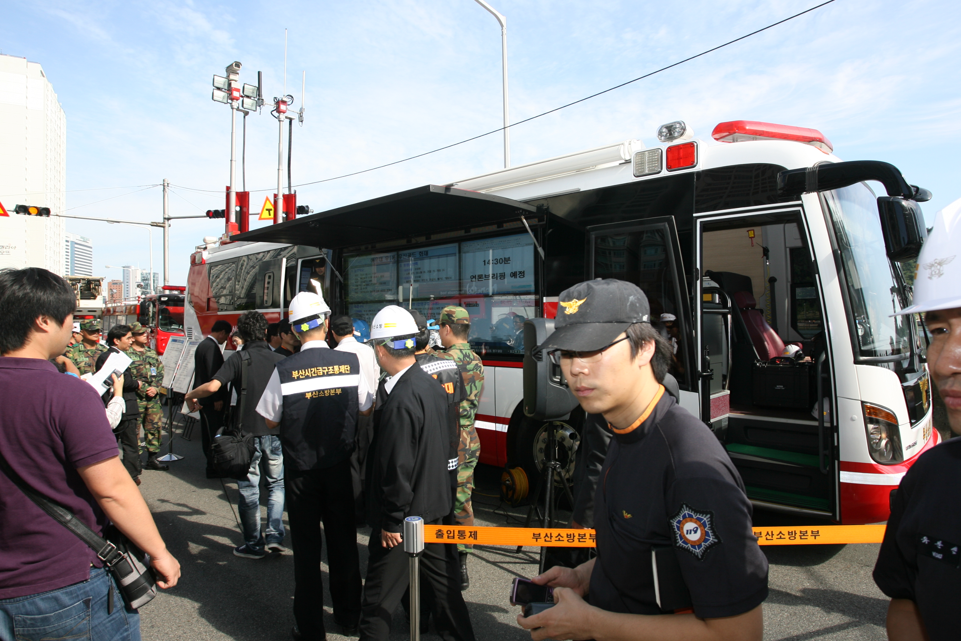 우신골든스위트 화재 사고